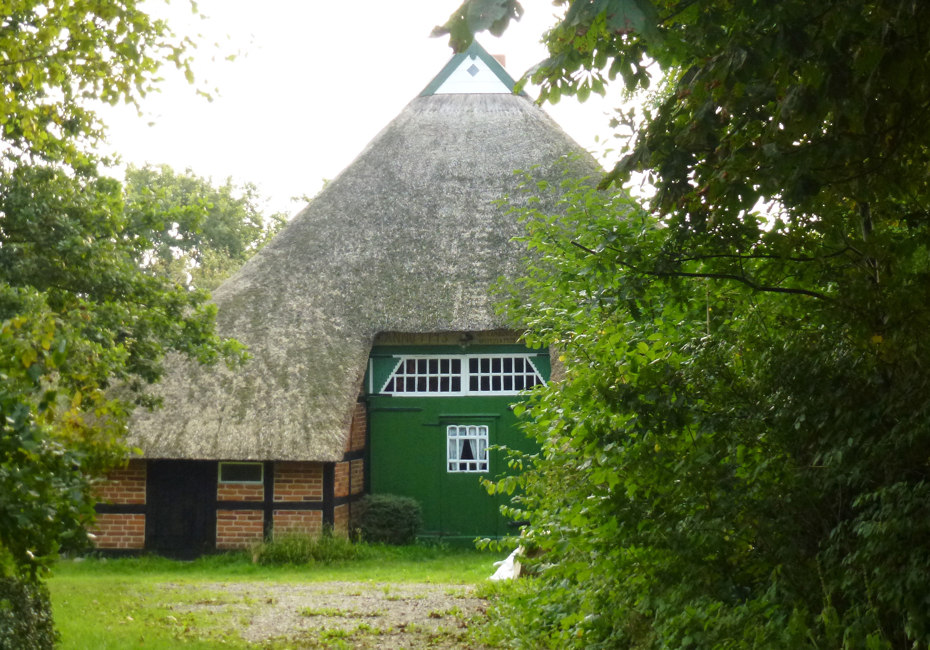 Döhnsdorf, Dorfstrasse, "Handwerkerhaus", erbaut 1793.